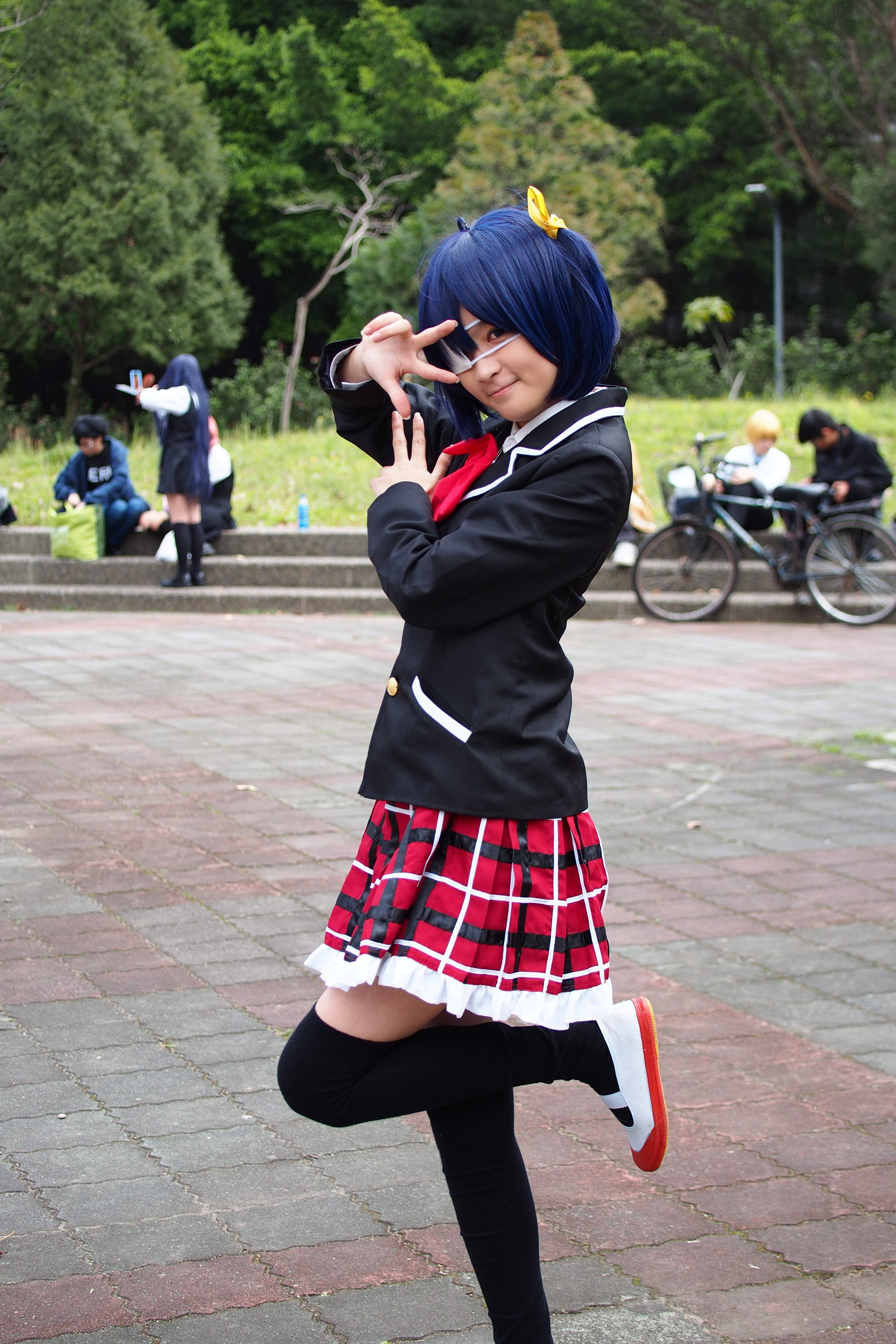 第21屆開拓動漫祭，《中二病也想談戀愛！》小鳥遊六花cosplayer。